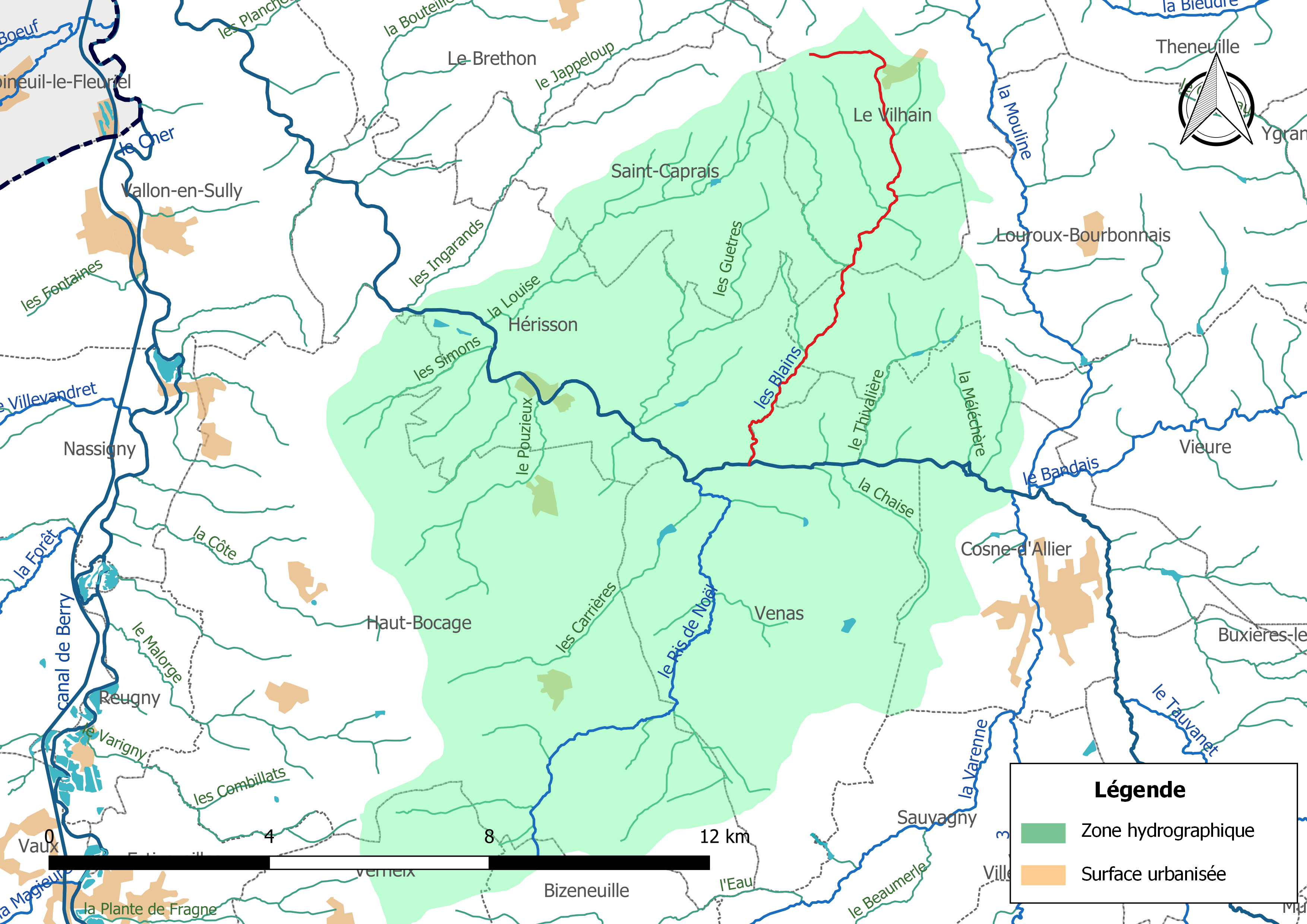 Carte du cours d'eau « les Blains » (France) et de la zone hydrographique dans laquelle il s'insère.